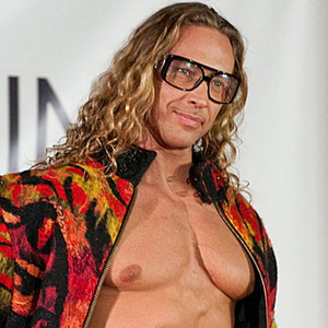 Сергей Глушко на закрытом показе Лены Лениной в ювелирном доме «Эстет»